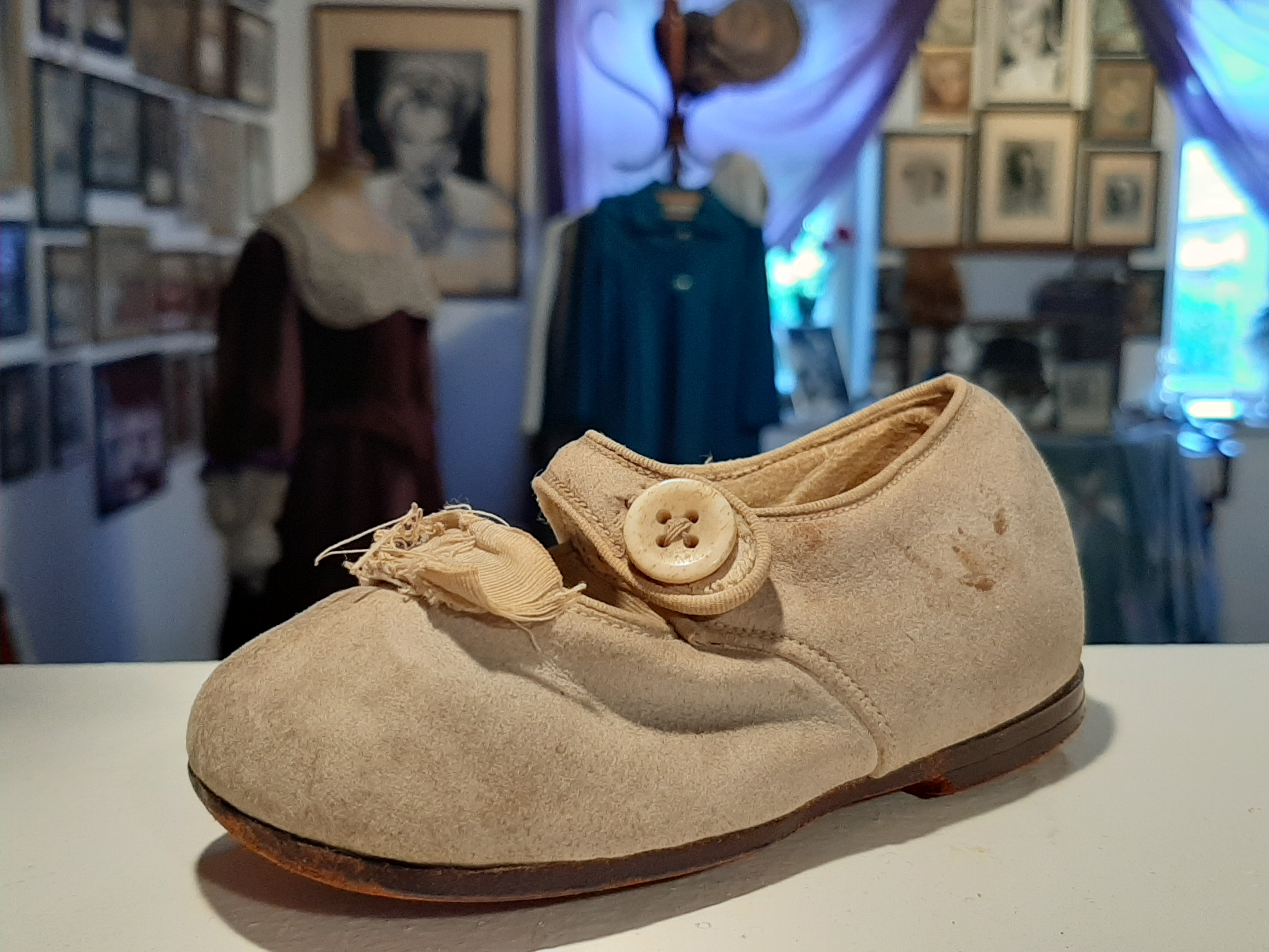 Tolnay Klári első kiscipője.